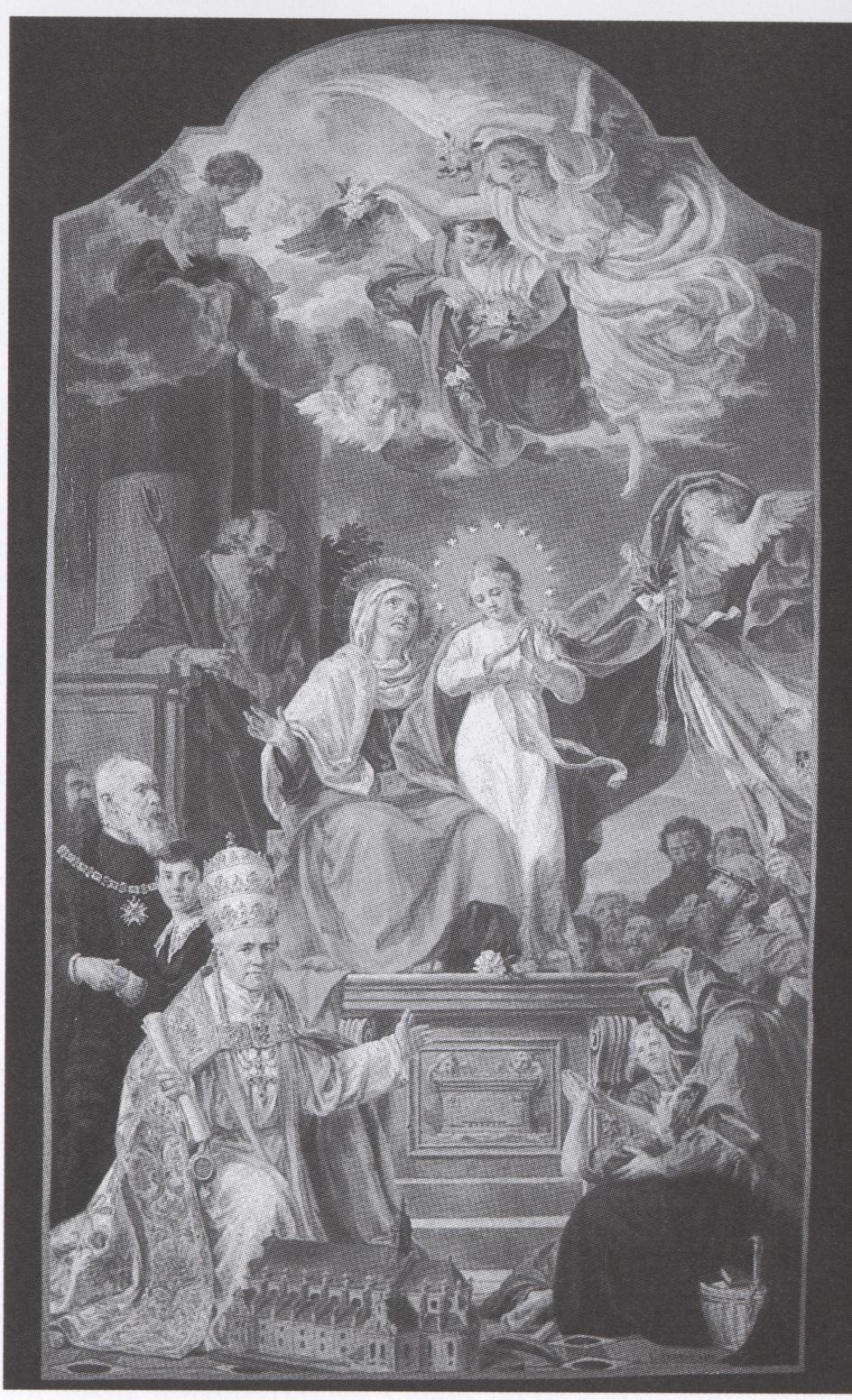 Hochaltarbild "St. Anna" in Altötting, von Leonhard Thoma